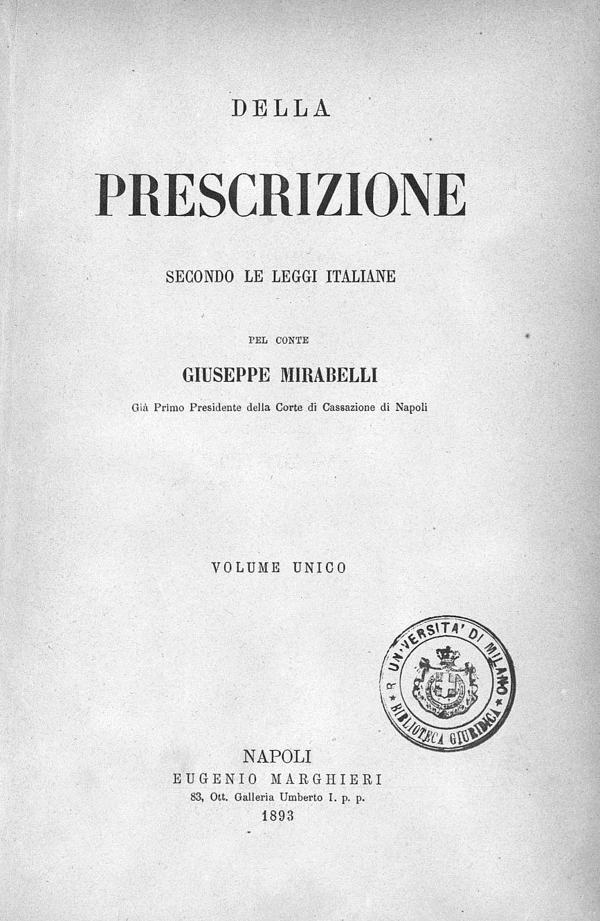 Frontespizio